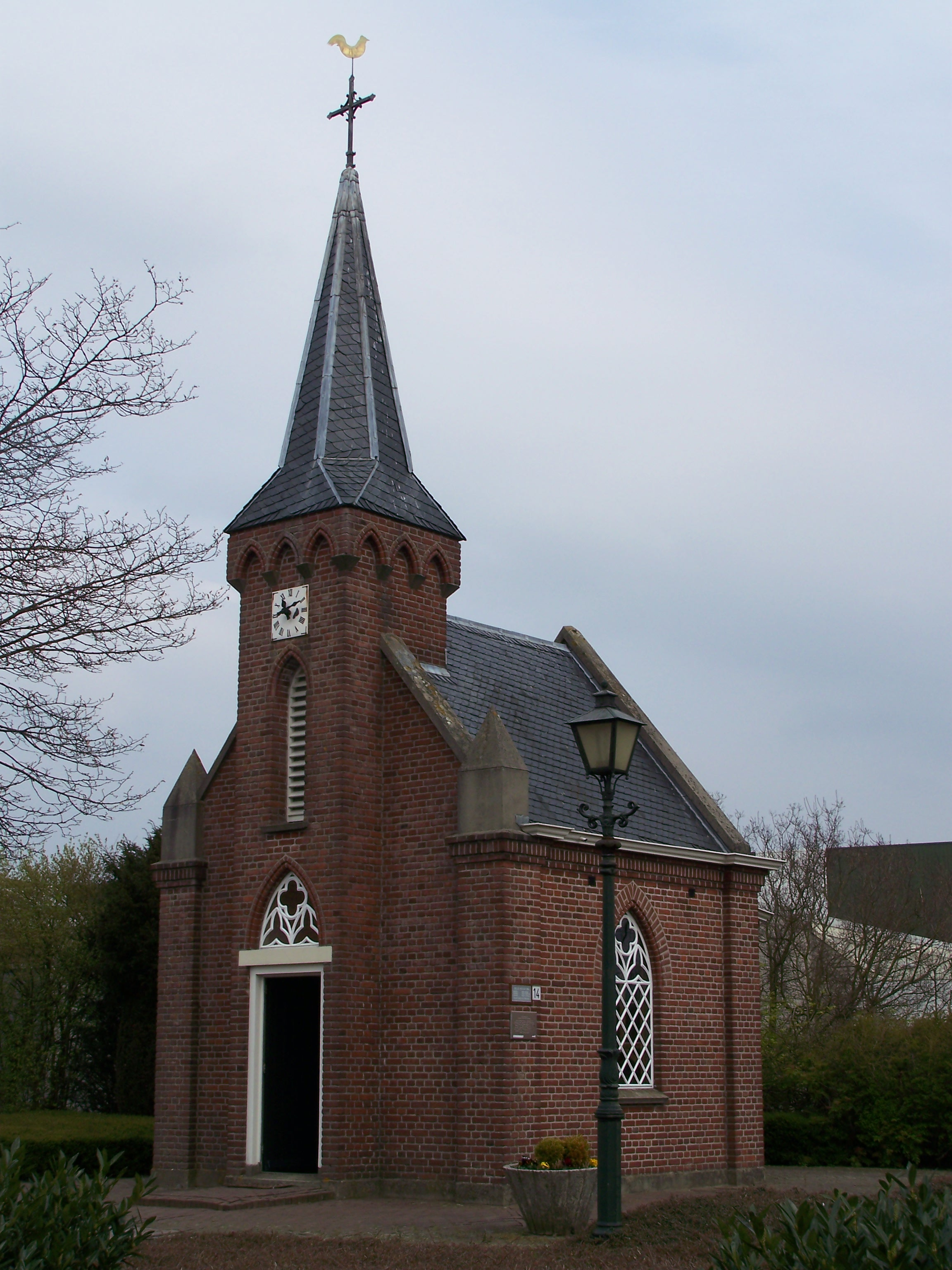 Kerkje de Rietstap